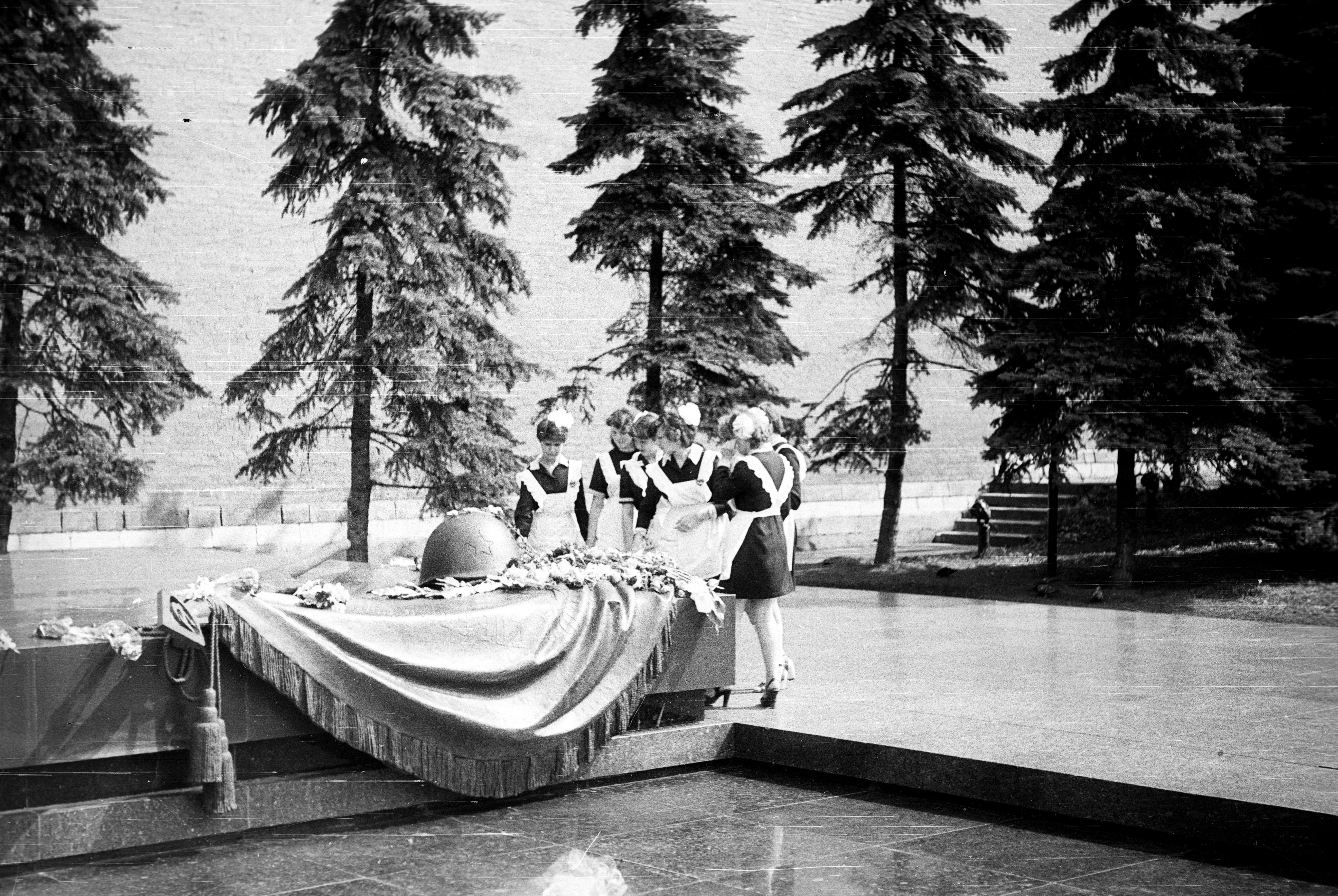 Последний звонок, 1981 г.